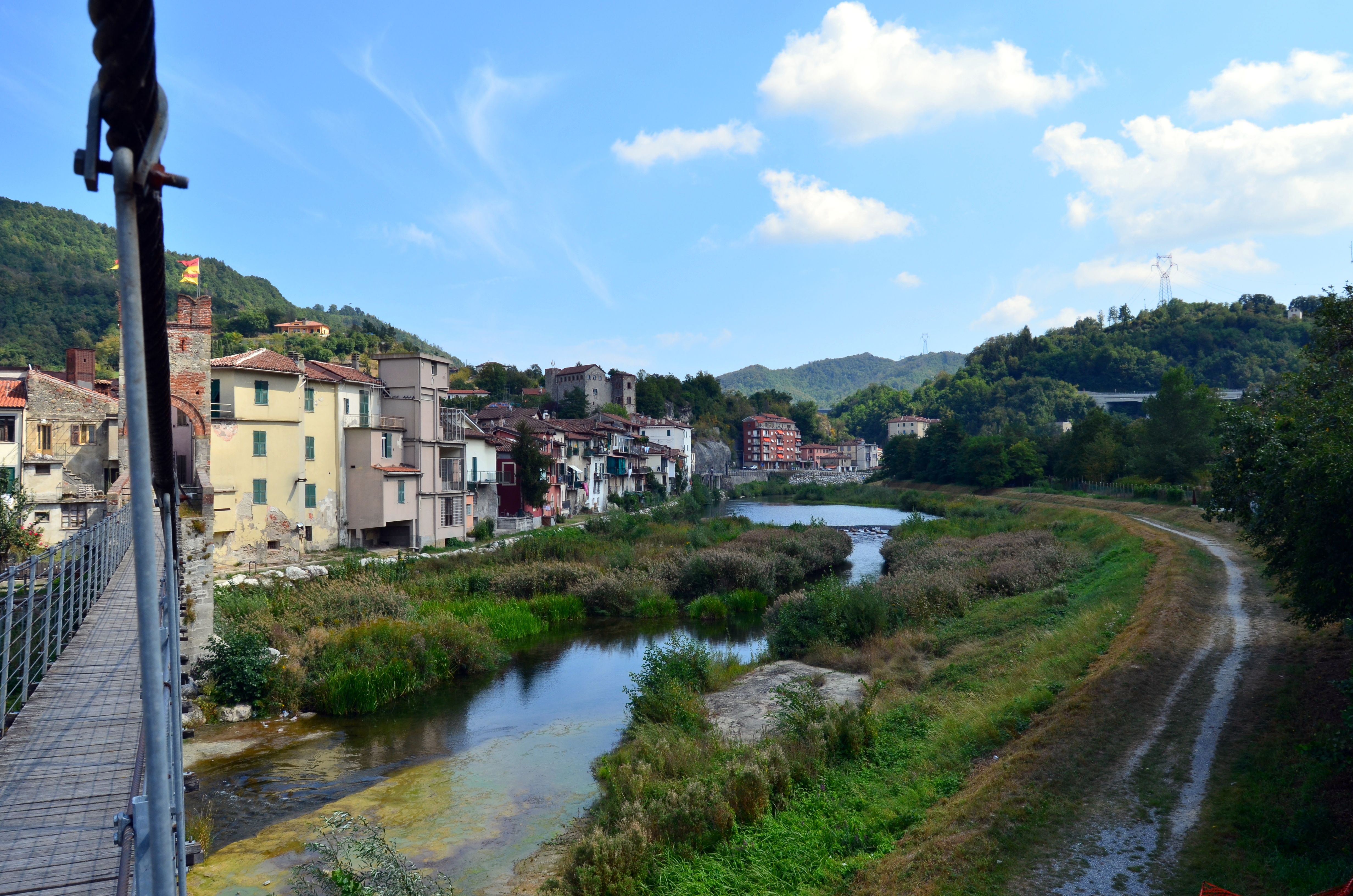 Il fiume della Bormida di Millesimo, Millesimo, Liguria, Italia